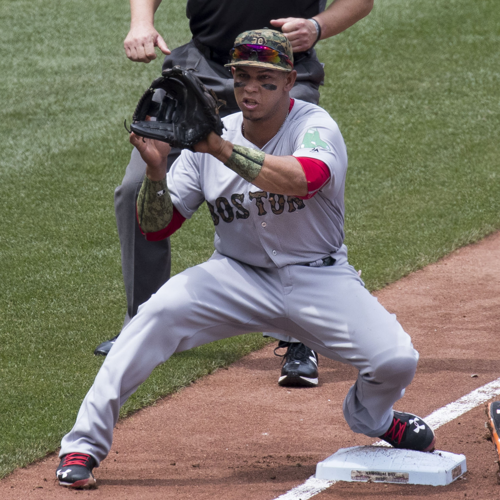 Marco Hernández